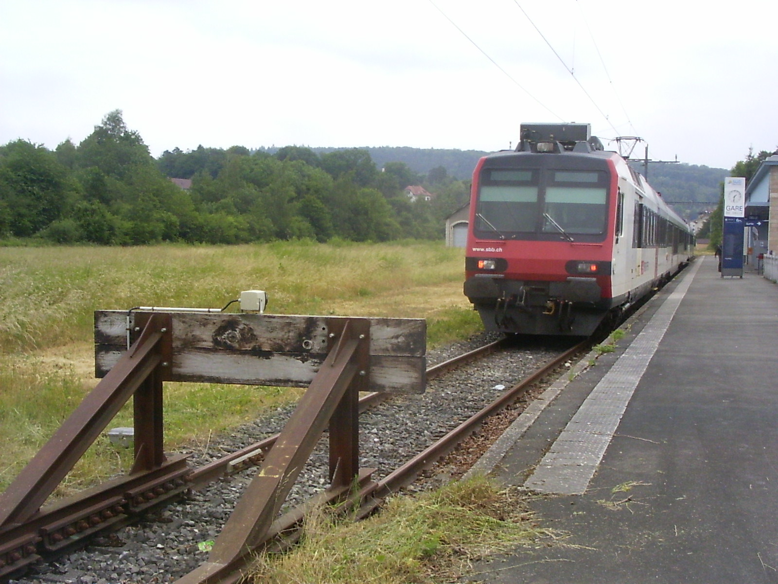 Station Delle